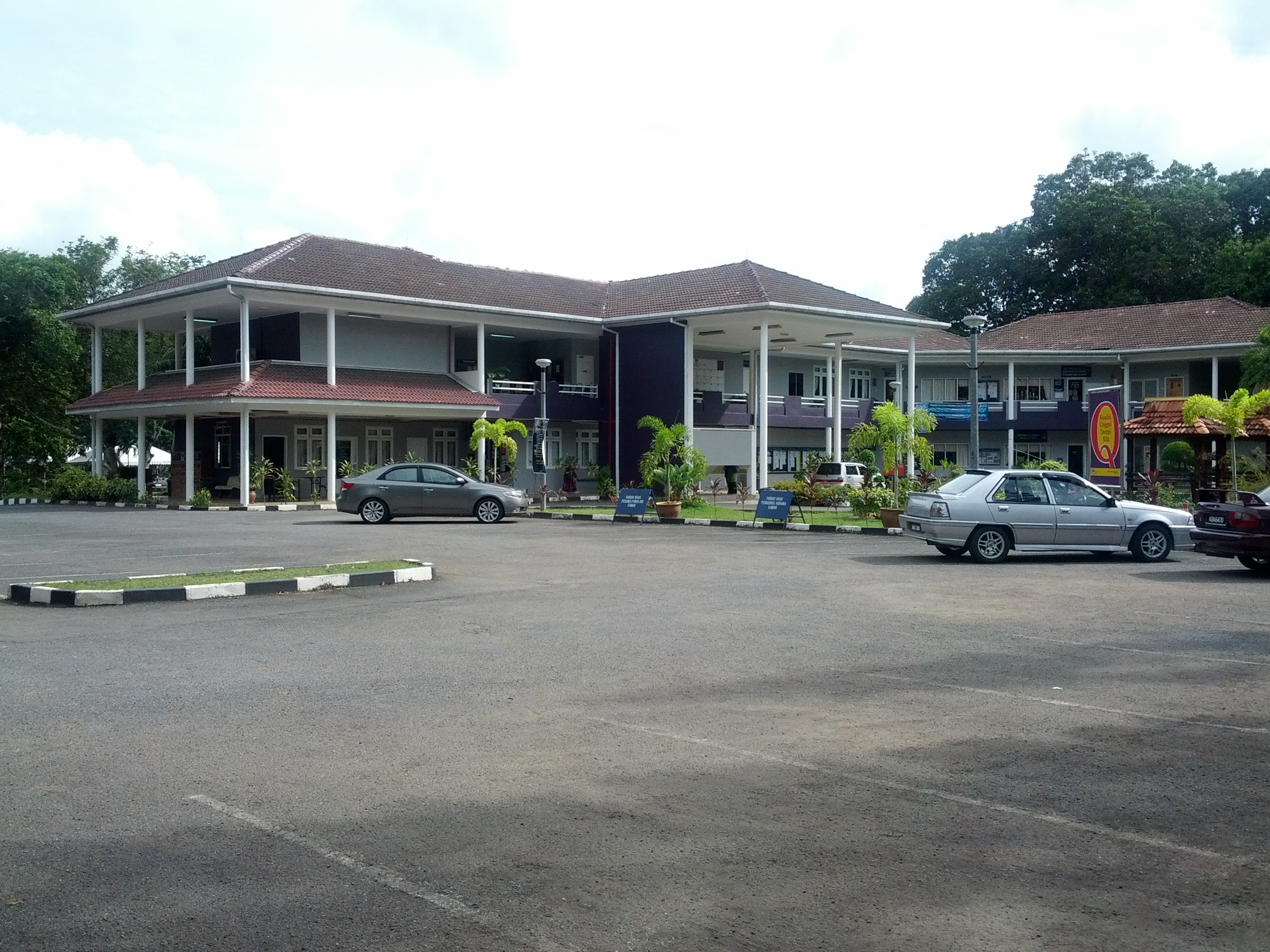 HEP, UiTM Perlis